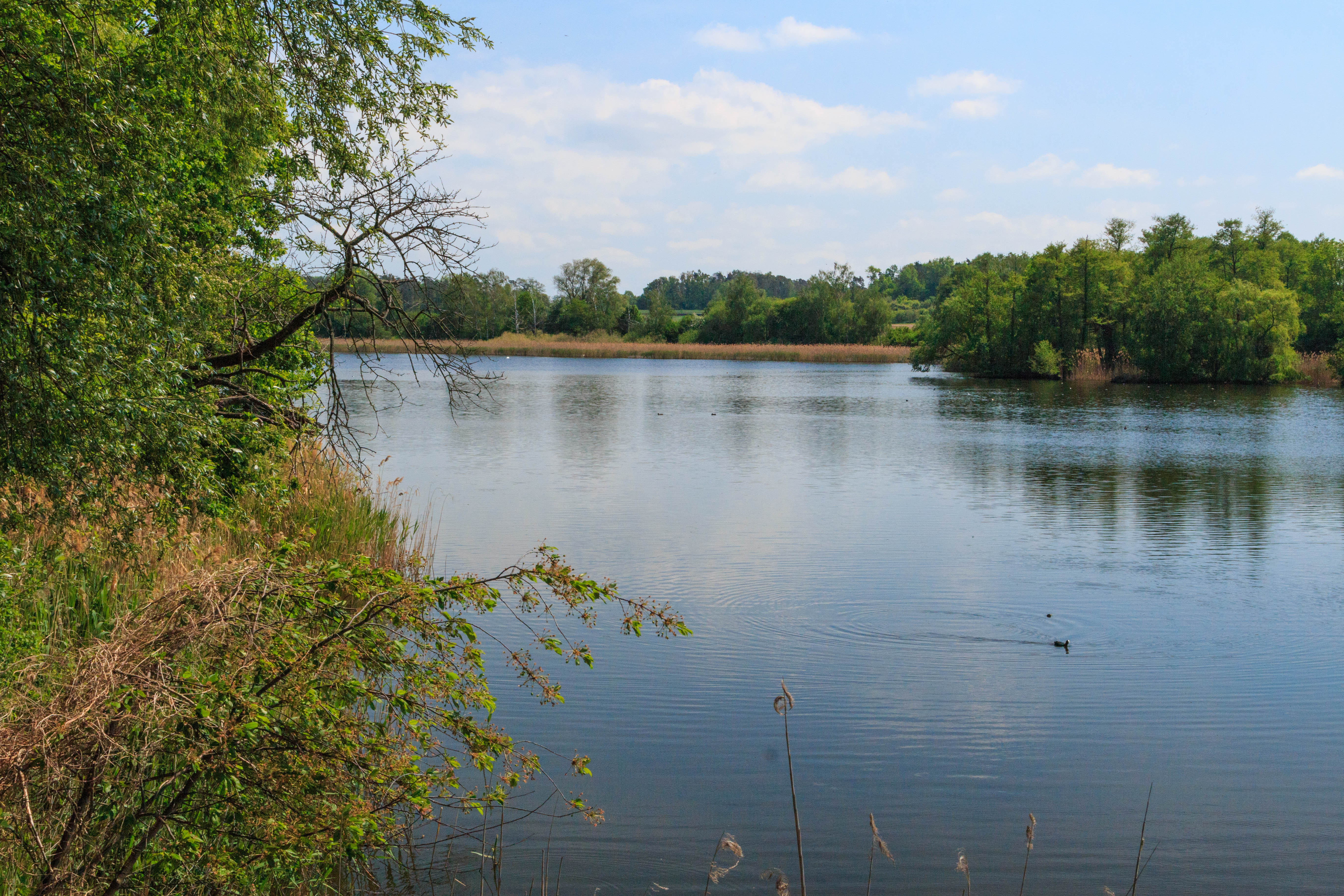 Rybník Labská u Sezemic Project: Vodstvo.